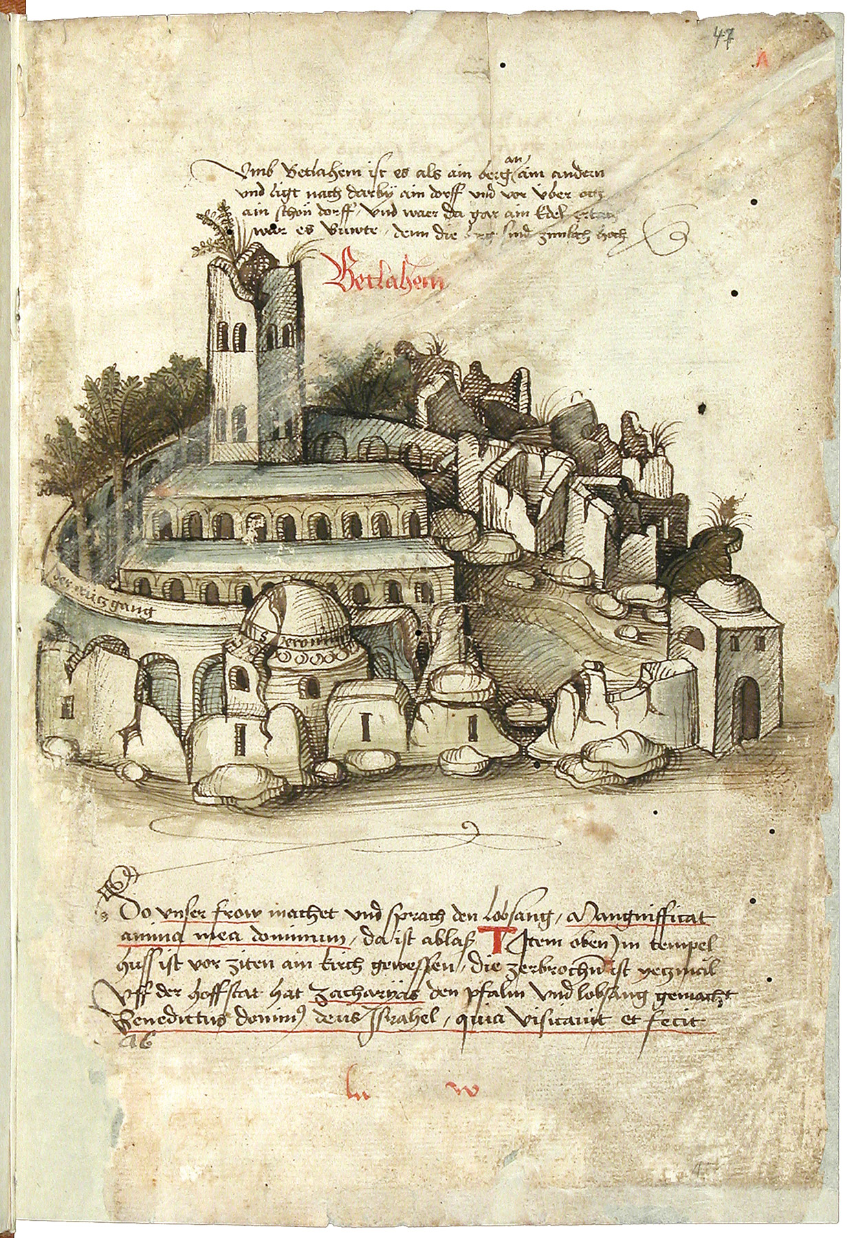 Schilderung einer Pilgerreise von Konstanz nach Jerusalem durch Konrad von Grünenberg, um 1487 Konrad von Grünenberg: Beschreibung der Reise von Konstanz nach Jerusalem - Cod. St. Peter, pap. 32. Handschrift, Bodenseegebiet (Konstanz?), um 1487. II + 53 Blätter, 32x21, mit 31 kolorierten Zeichnungen der Reiseroute von Venedig bis Palästina. Text in alemannischer Mundart.